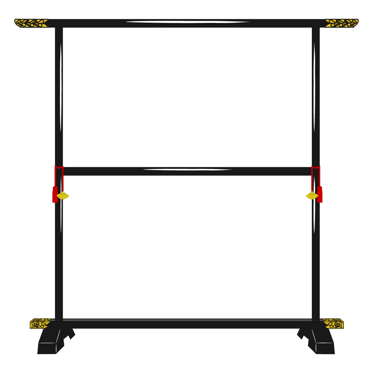 衣桁（衣紋掛け）のイメージ図